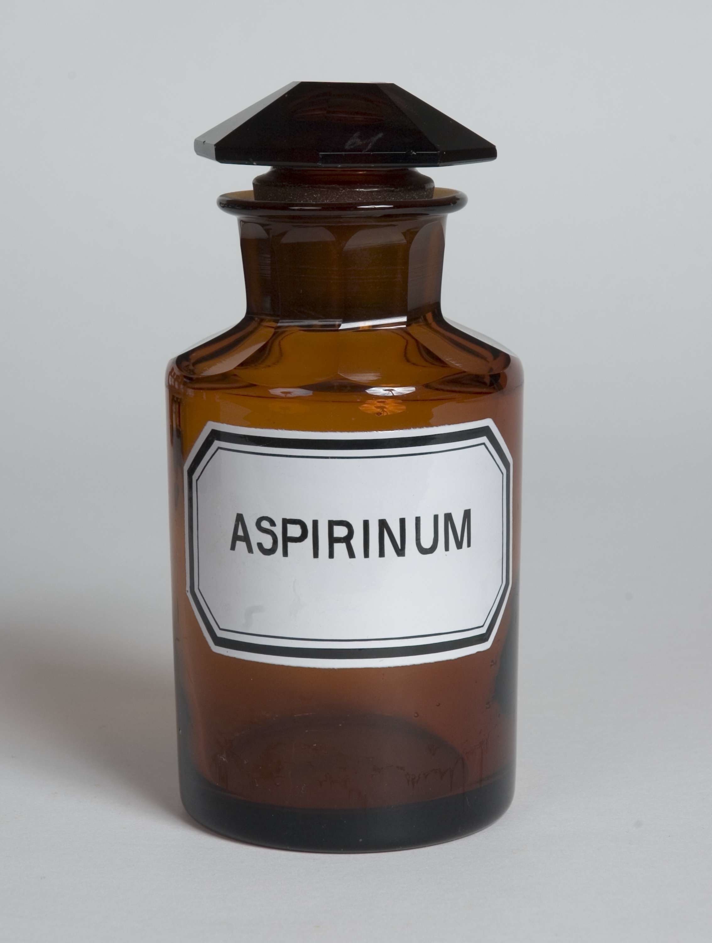 Standglass med propp. 8-kantet propp. Produksjon:Produsent, sikker: UkjentProduksjonssted: Ukjent sted.